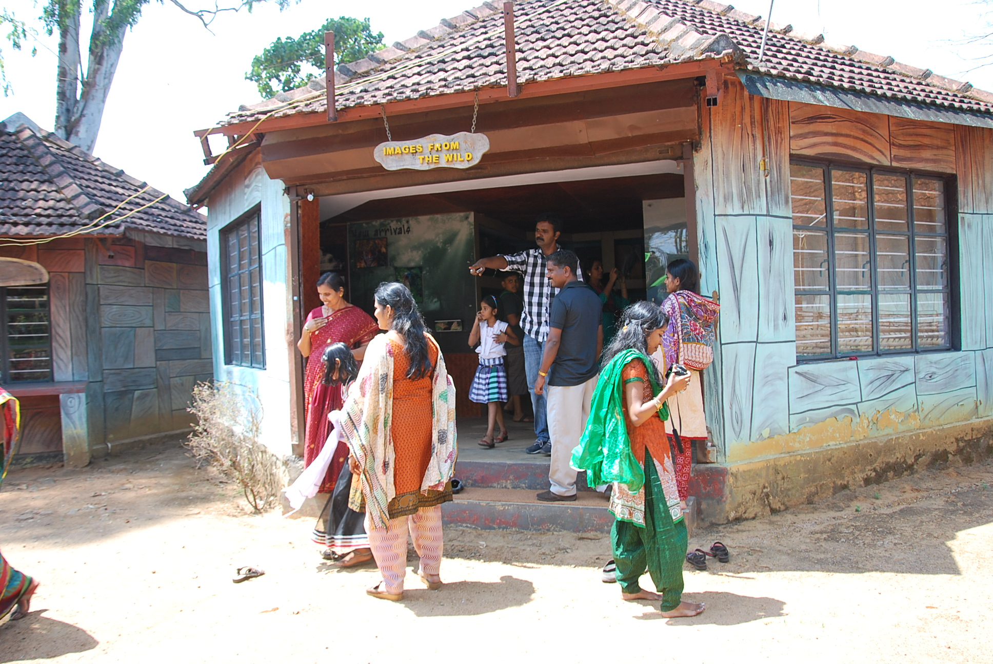 പരമ്പിക്കുളത്തെ കാഴ്ചബംഗ്ലാവ്